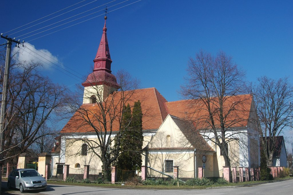 Dojč, church